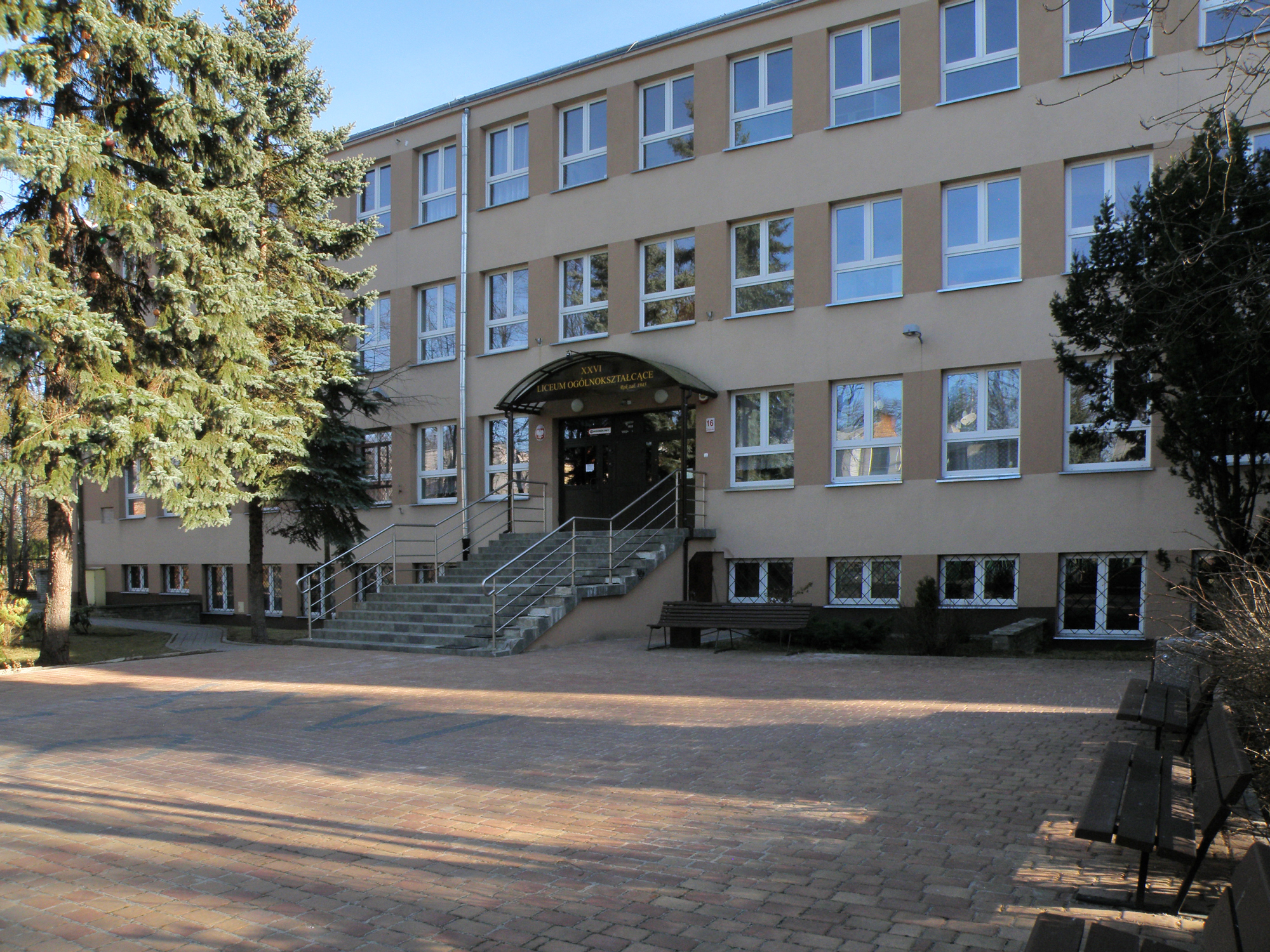 XXVI Liceum Ogólnokształcące im. gen. Henryka Jankowskiego "Kuby", ul. Alpejska 16, 04-628 Warszawa